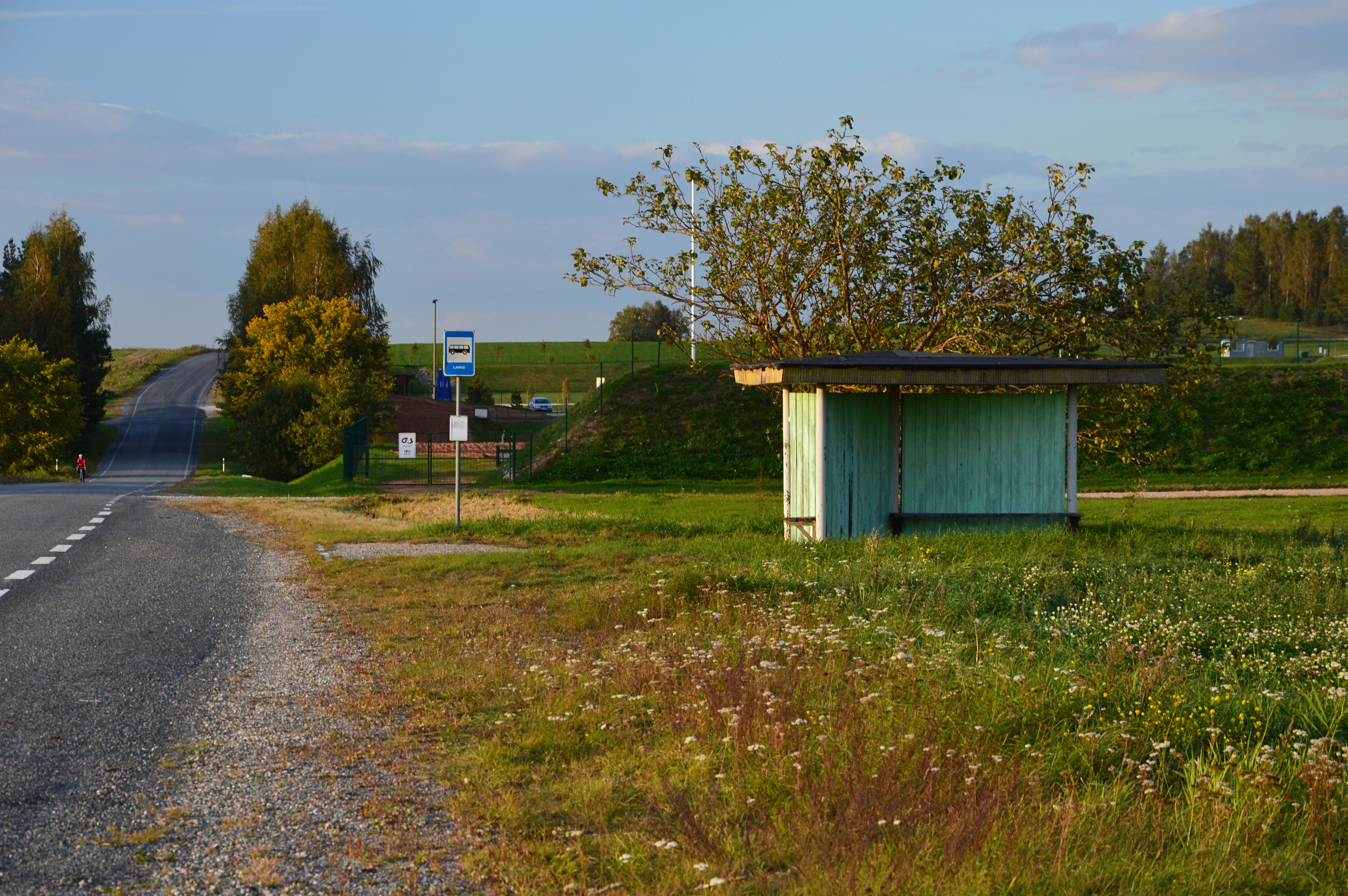 Lange küla bussipeatus